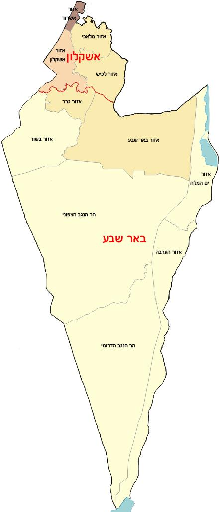 מחוז הדרום, מחולק לנפות